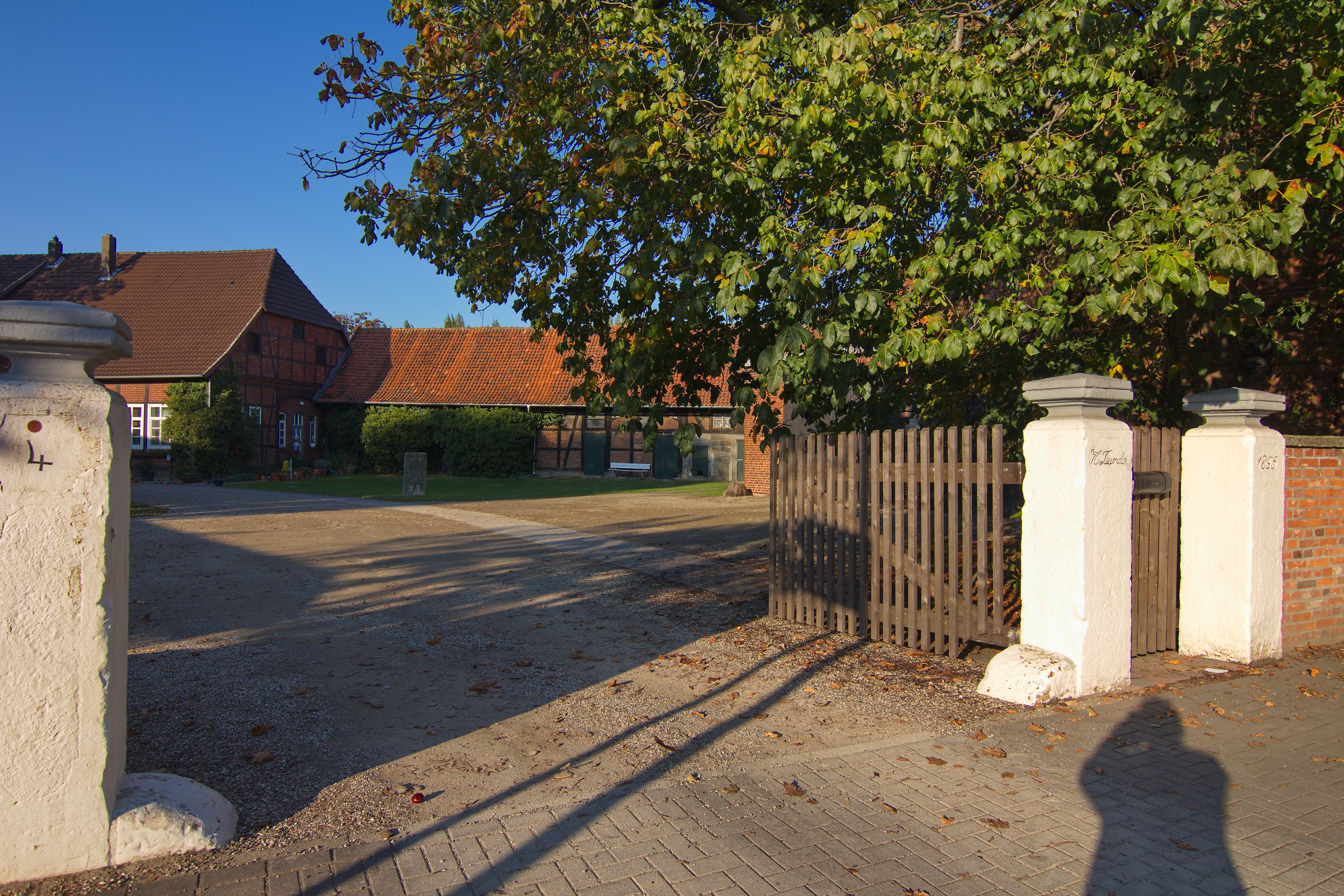 Baudenkmal. Wagentor und Pforte mit Torpfosten (Inschrift: H. Lunde auf dem mittleren Pfosten, 1855 auf dem rechten) vor der Hofanlage an der Wülfeler Str. 4 in Bemerode (Hannover), Niedersachsen, Deutschland